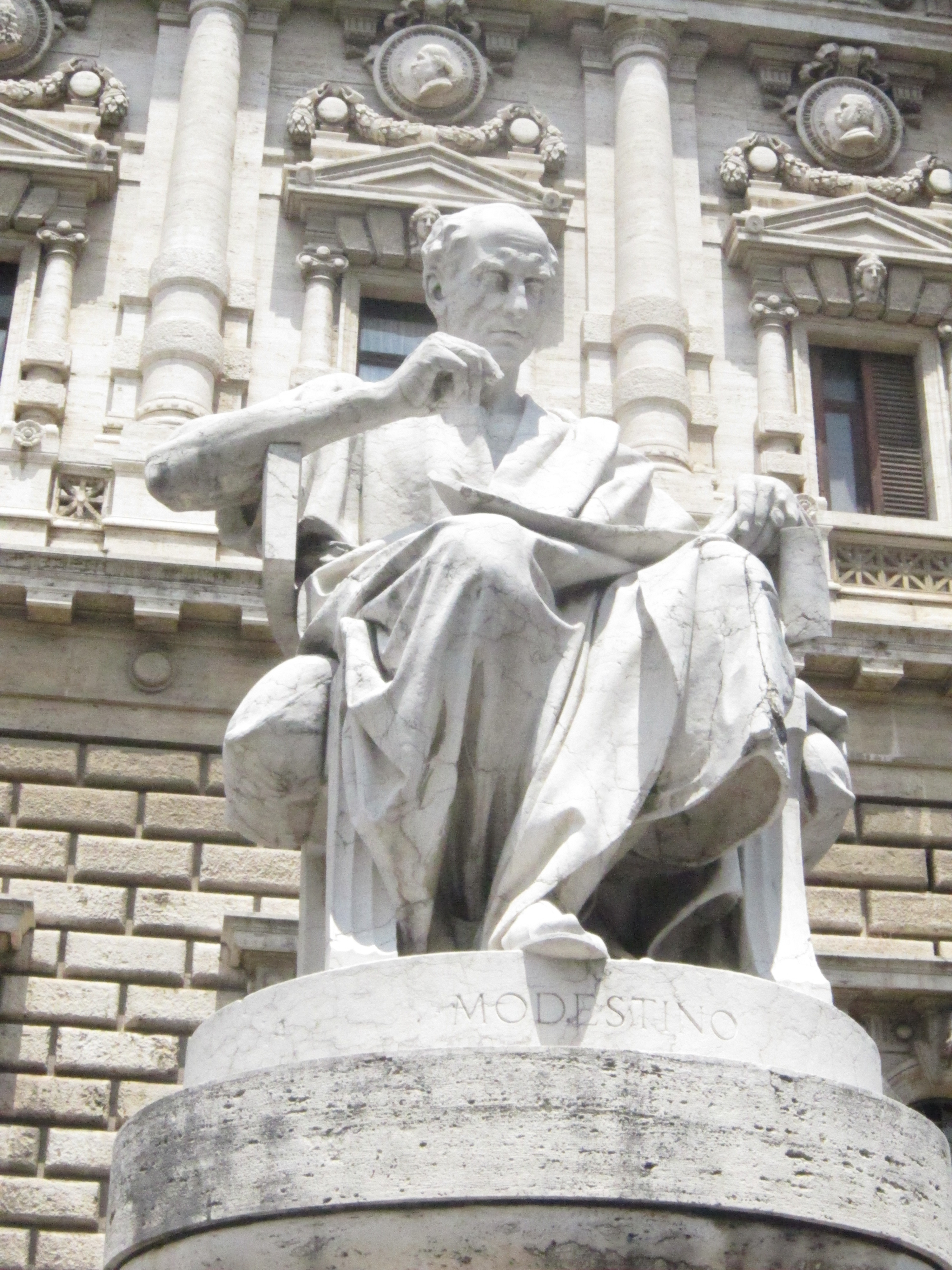 Statua di Erennio Modestino, giureconsulto romano del III secolo. Autore: Emilio Gallori (1846–1924) Description Italian sculptor Date of birth/death3 April 184624 December 1924Location of birth/deathFlorenceSienaAuthority control VIAF: 96528335 ISNI: 0000 0000 8402 7550 ULAN: 500112715 GND: 142369322 SBN: IT\ICCU\CUBV\058720